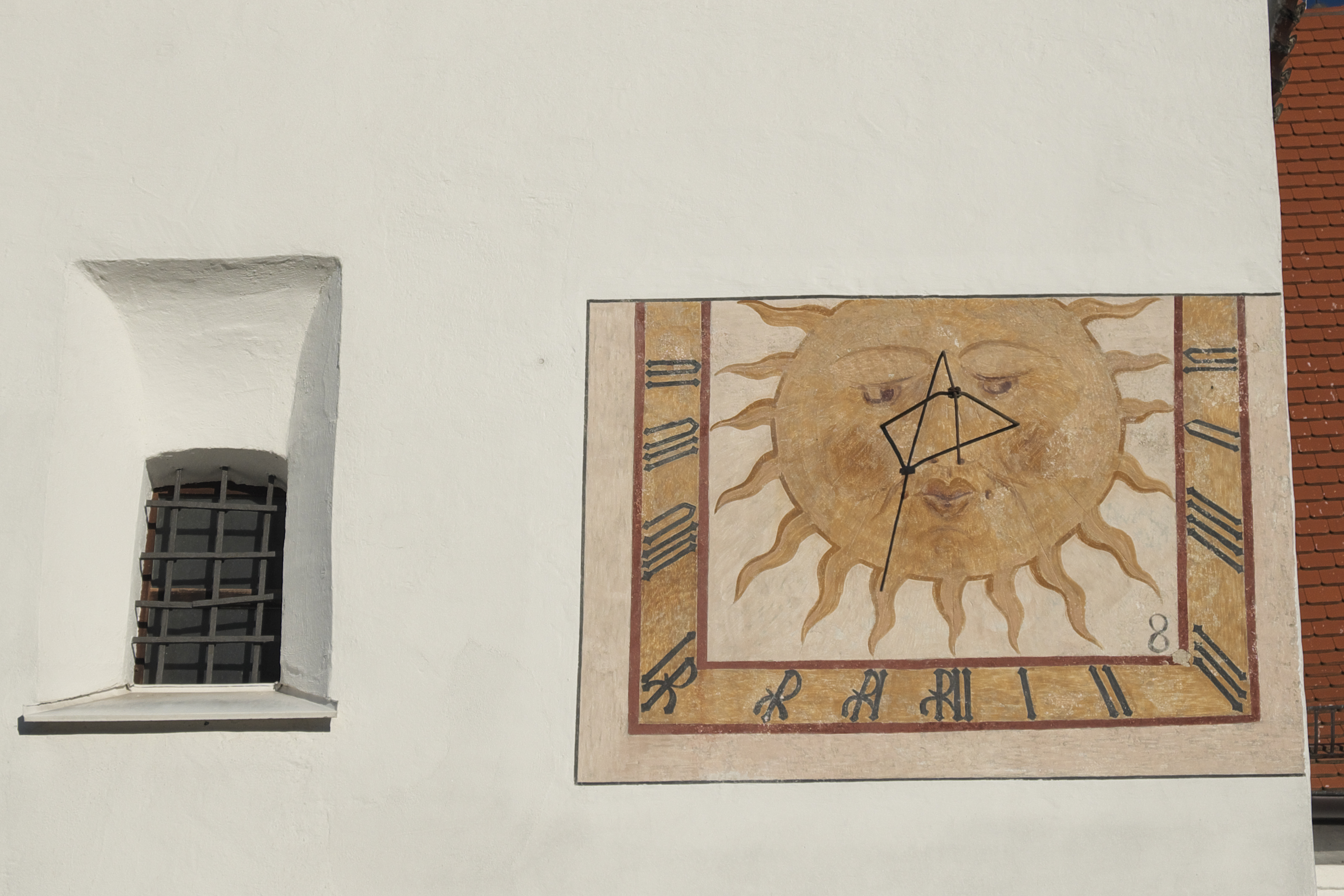 Katholische Pfarrkirche St. Johannes Evangelist in Hohenkammer im Landkreis Freising (Bayern/Deutschland), Sonnenuhr